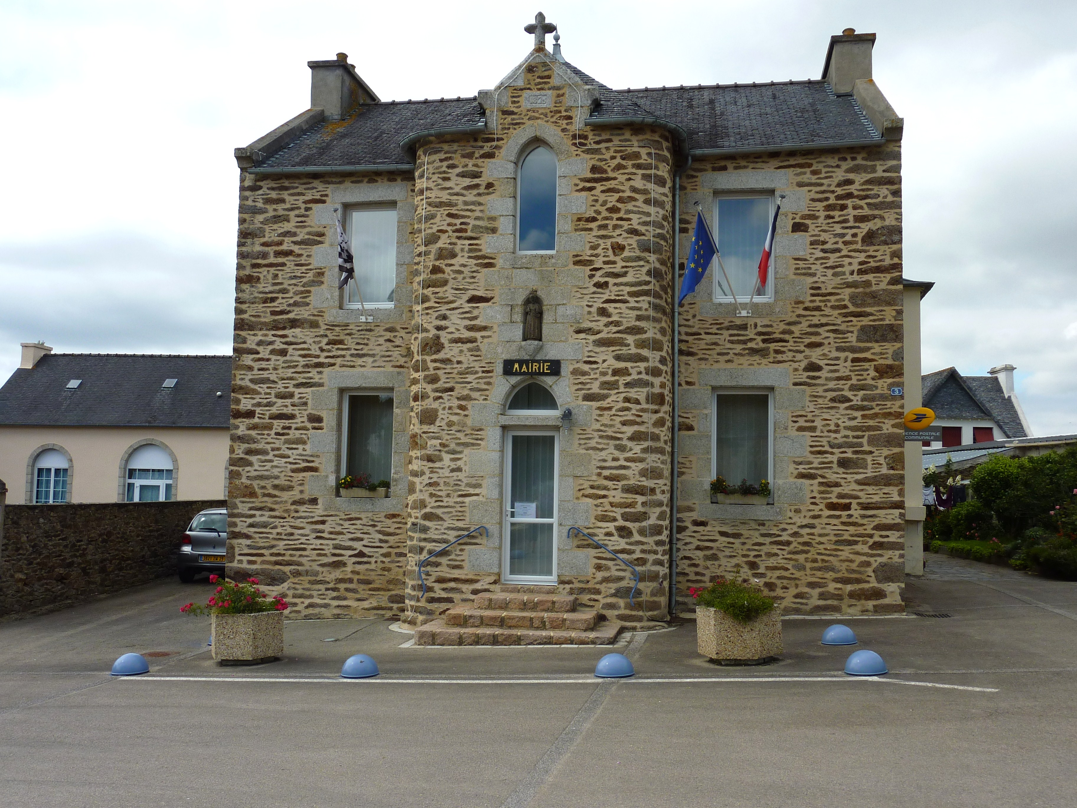 Loc-Eguiner-Saint-Thégonnec: la mairie